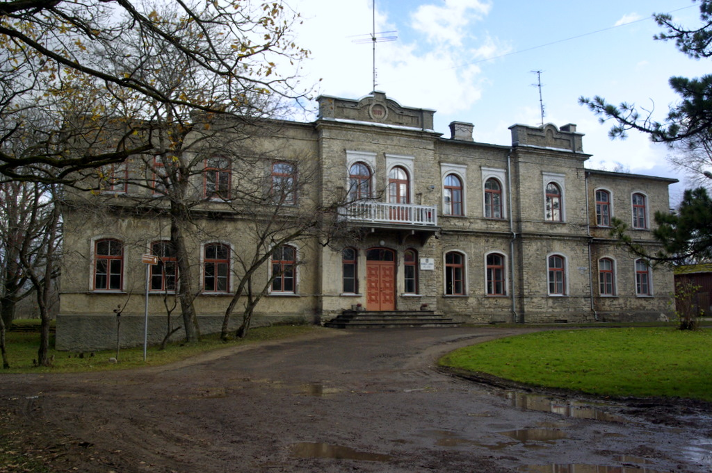 Kunda alumise ehk vana elektrijaama direktori mõis.